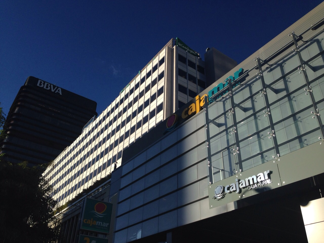 Sede de Cajamar y BCC en el Paseo de la Castellana, Madrid.